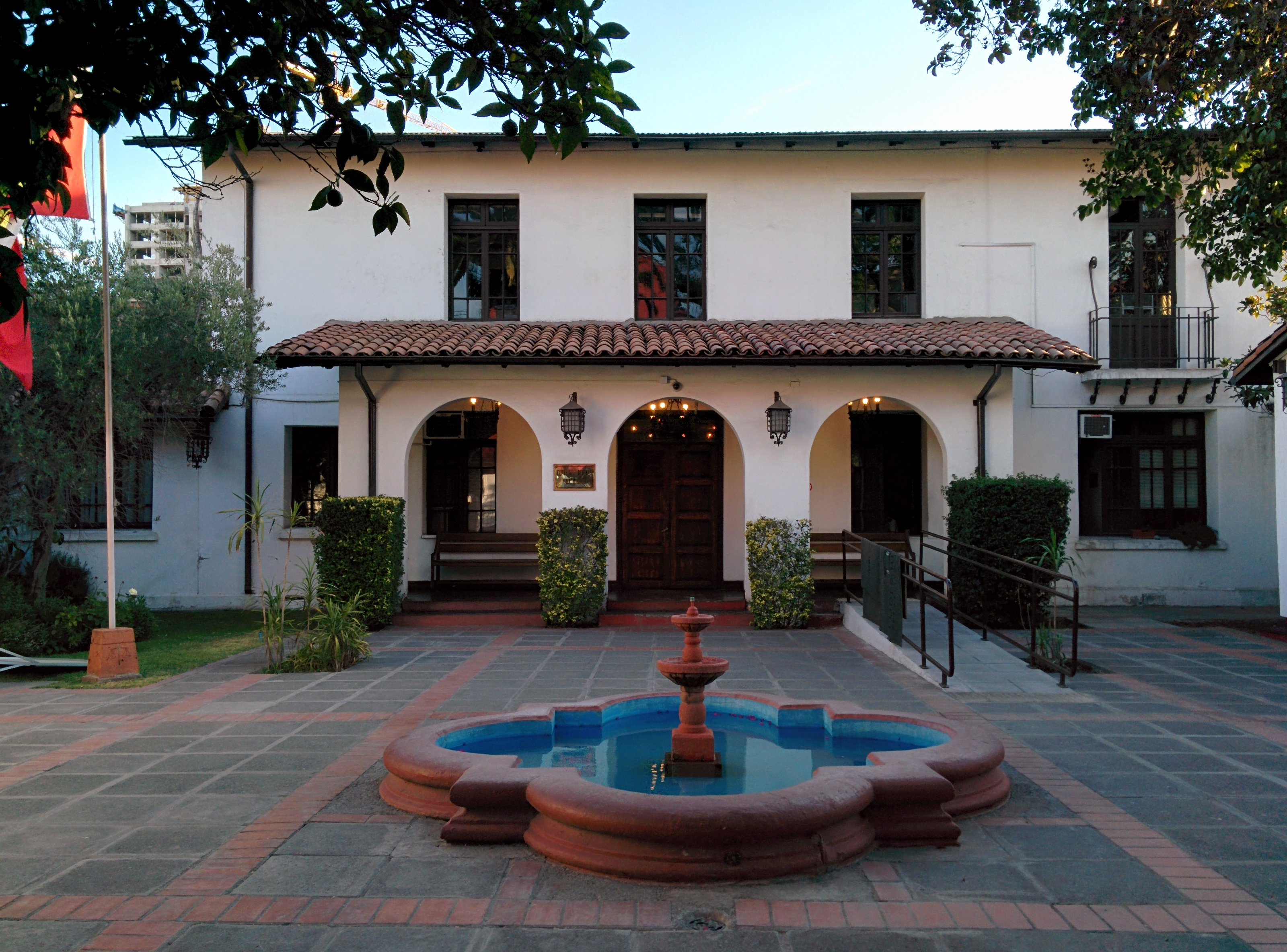 Corte de Apelaciones de San Miguel, Santiago